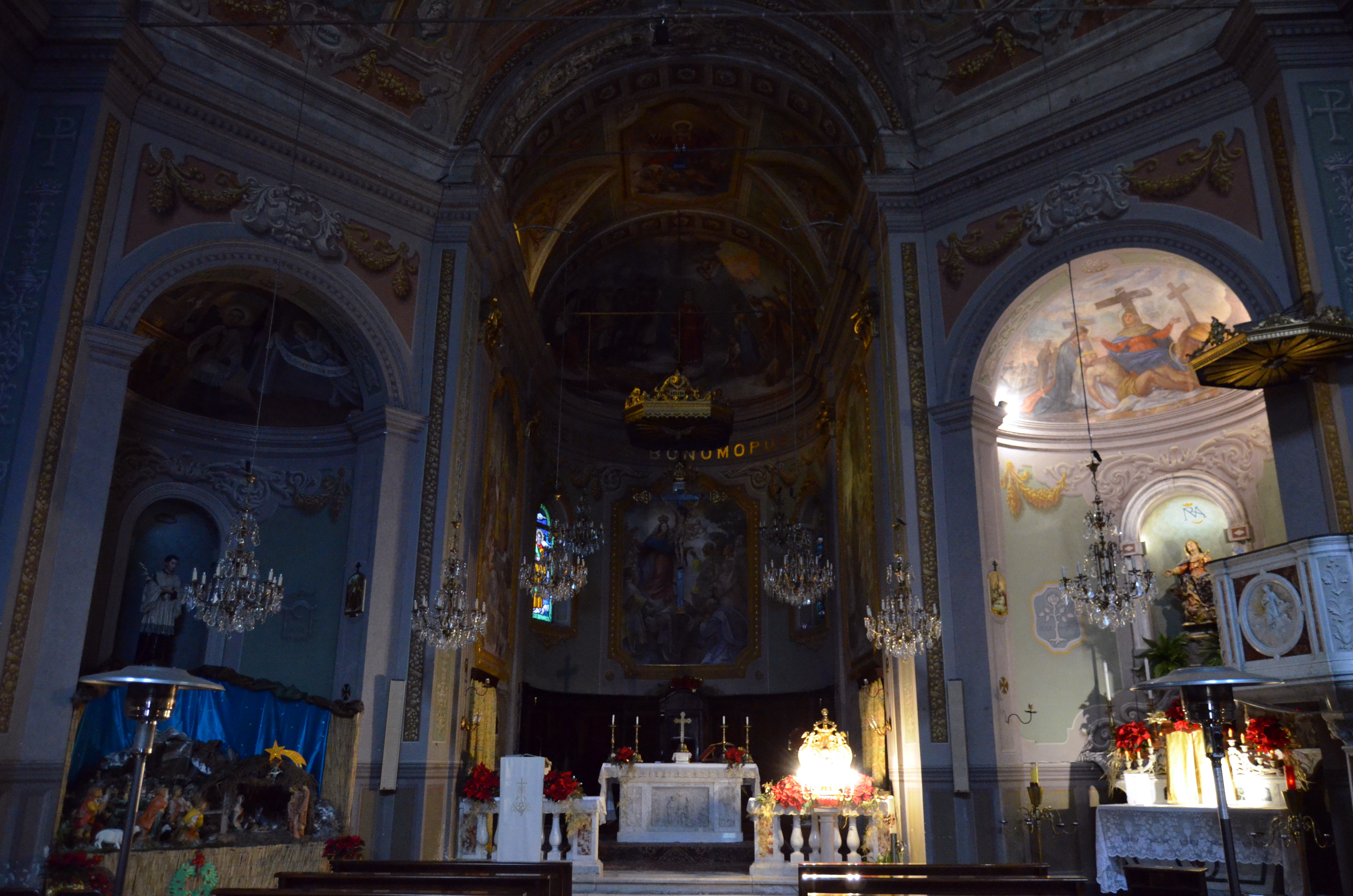 Chiesa di San Lorenzo, Teriasca, Sori, Liguria, Italia